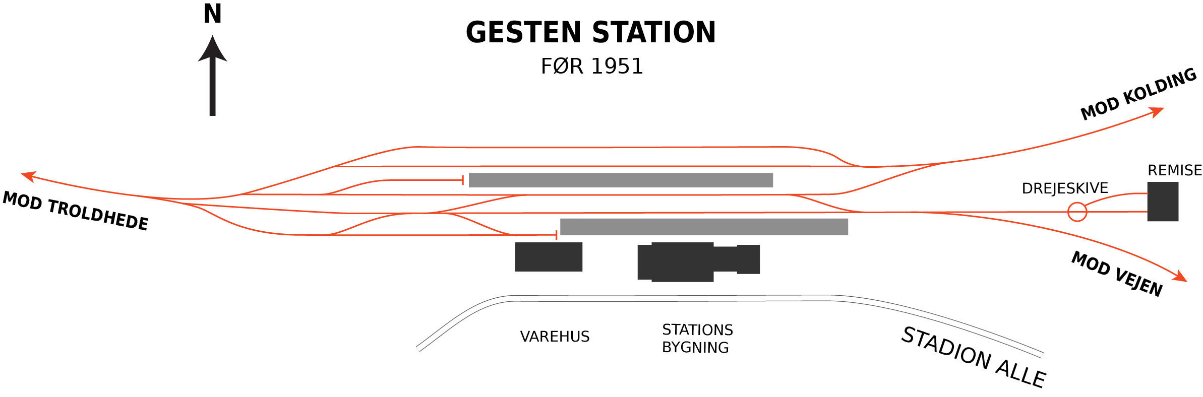 Oversigt over Gesten Stations banelinjer